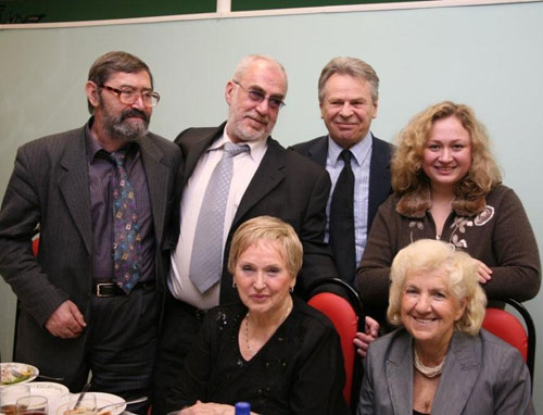 ИСТФАК МГУ